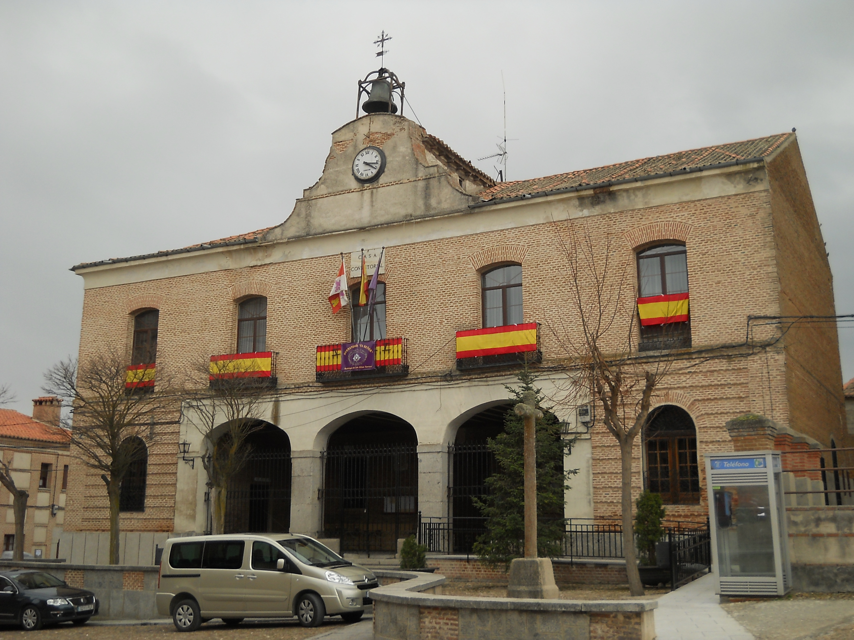 Municipio di Madrigal de las Altas Torres, Ávila, Spagna